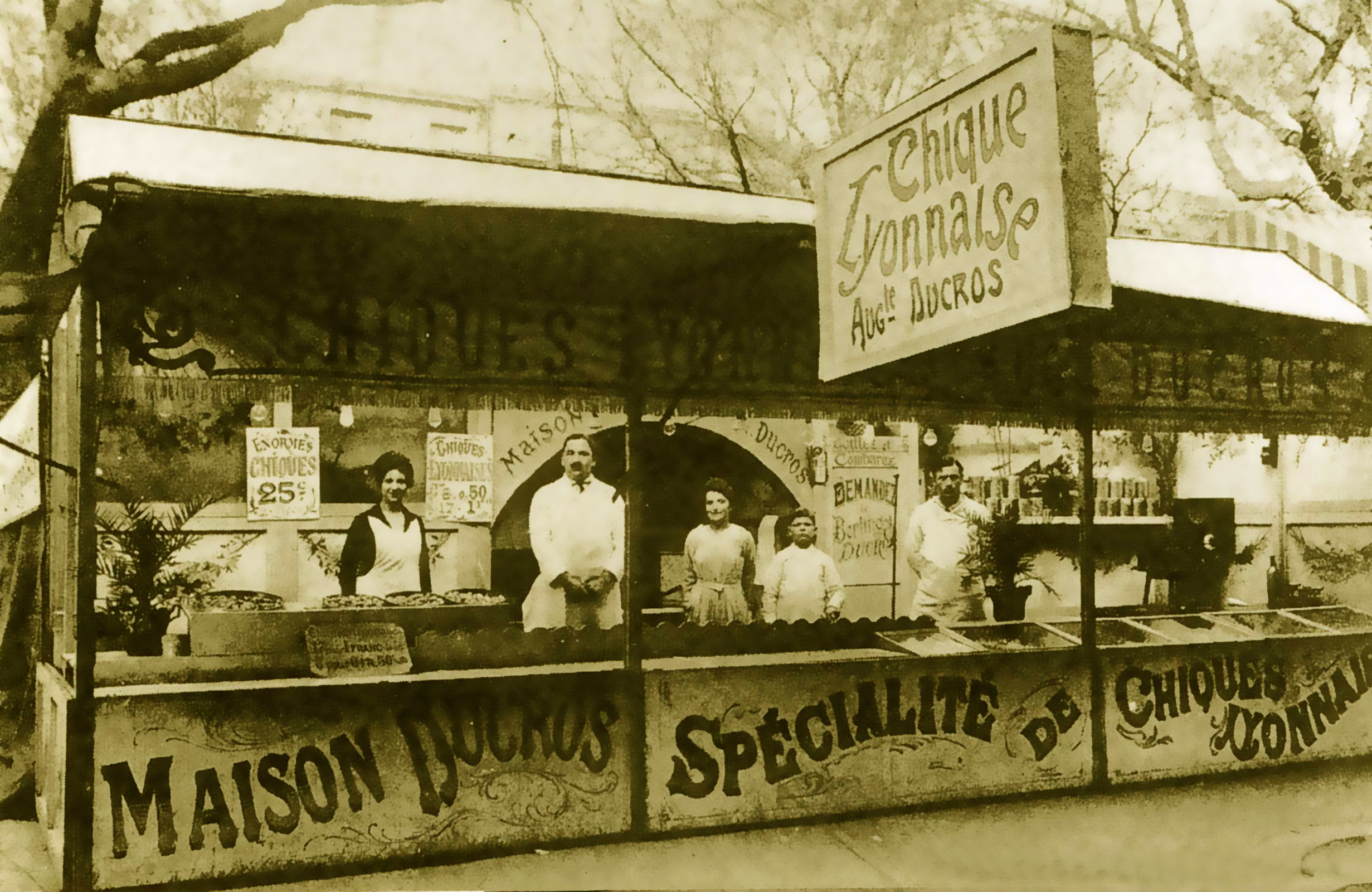 Baraque foraine à la Foire Saint-André d'Avignon au début du XXe siècle